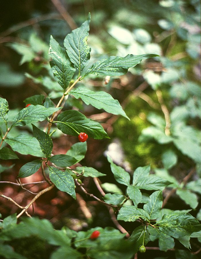 Alpen-Heckenkirsche (Lonicera alpigena), Geißblattgewächse (Caprifoliaceae) - Österreich/Austria/Autriche: Niederösterreich, Erlauftal E Gaming, Vordere Tormäuer